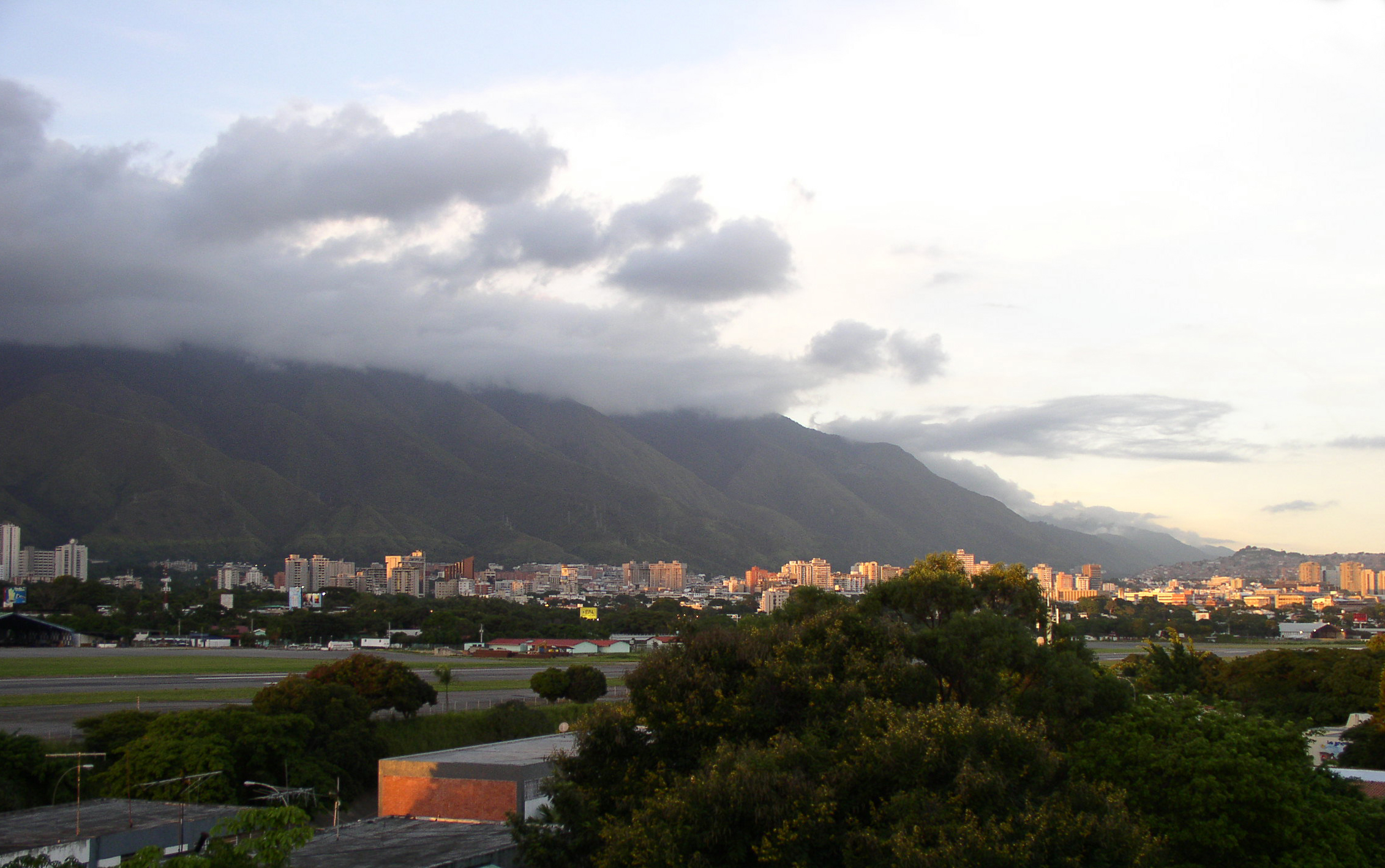 Author: Sandra Carrillo Kosak. Personal Photo. Caracas,Venezuela.